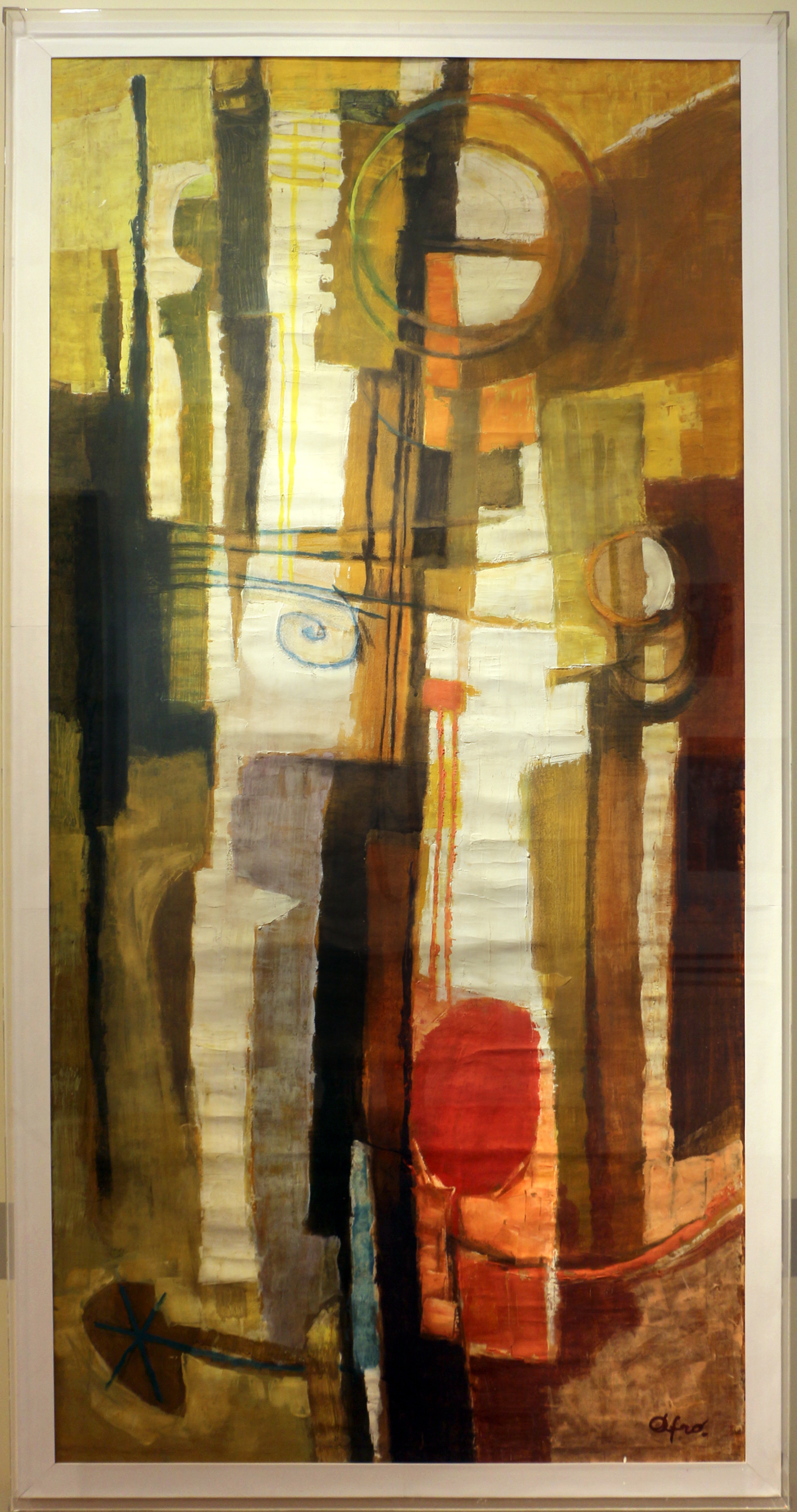 Collezione Mosaici Moderni - NB: Museum explicitly authorized the upload of its contemporary art collection for WLM 2016 (for further info ask WLM Italy organizators). This is a photo of a monument which is part of cultural heritage of Italy.